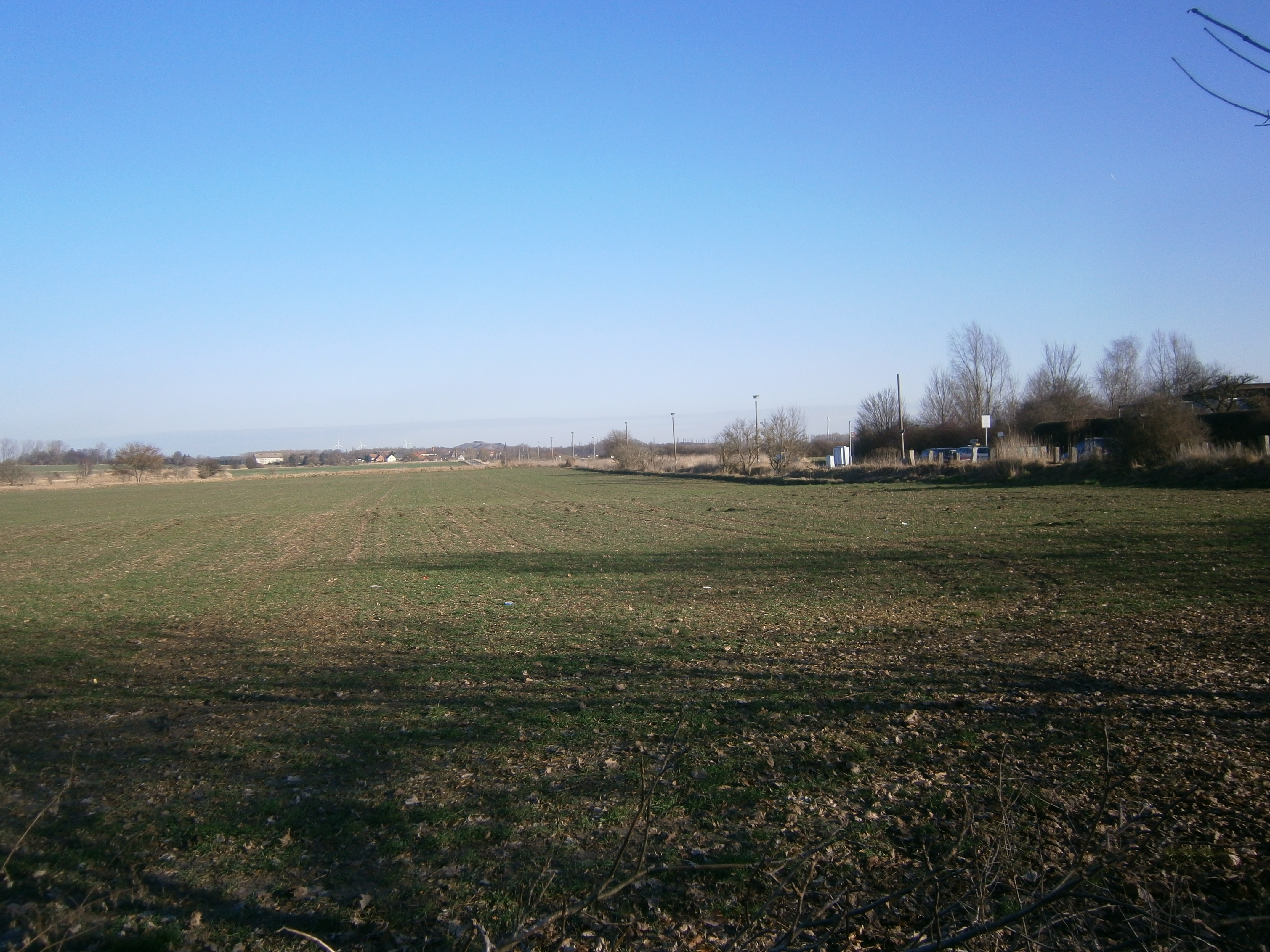 Mönchmühler Straße ist eine Straße in Berlin-Blankenfelde. Hier der Blick nordwärts von der vormaligen Bahntrasse der Industriebahn Tegel-Friedrichsfelde zur Mönchmühler Straße über das ehemalige Rieselgebiet hinweg..